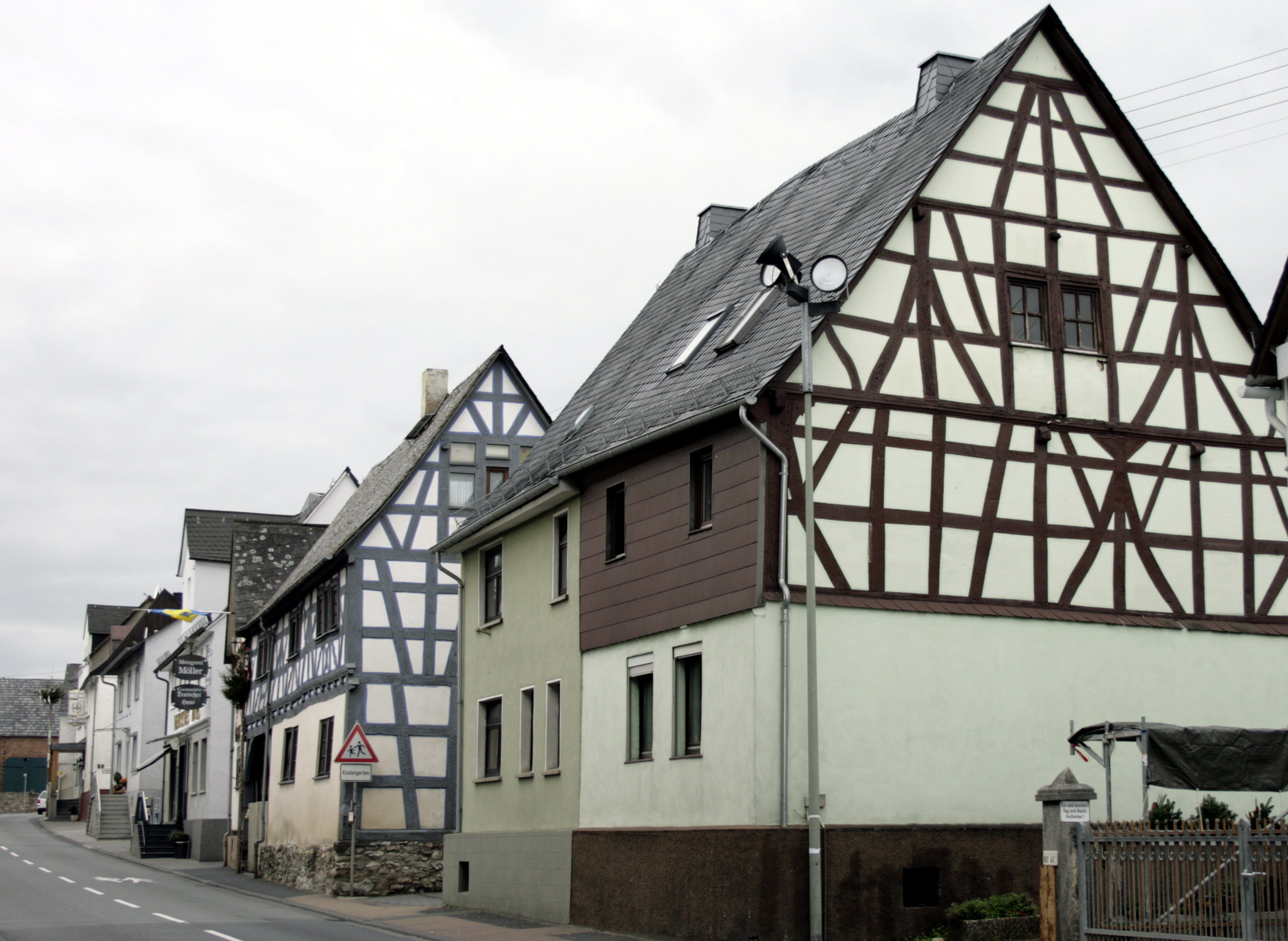 Historisches Gebäudeensembel in der Pfortenstraße in Elz, Deutschland